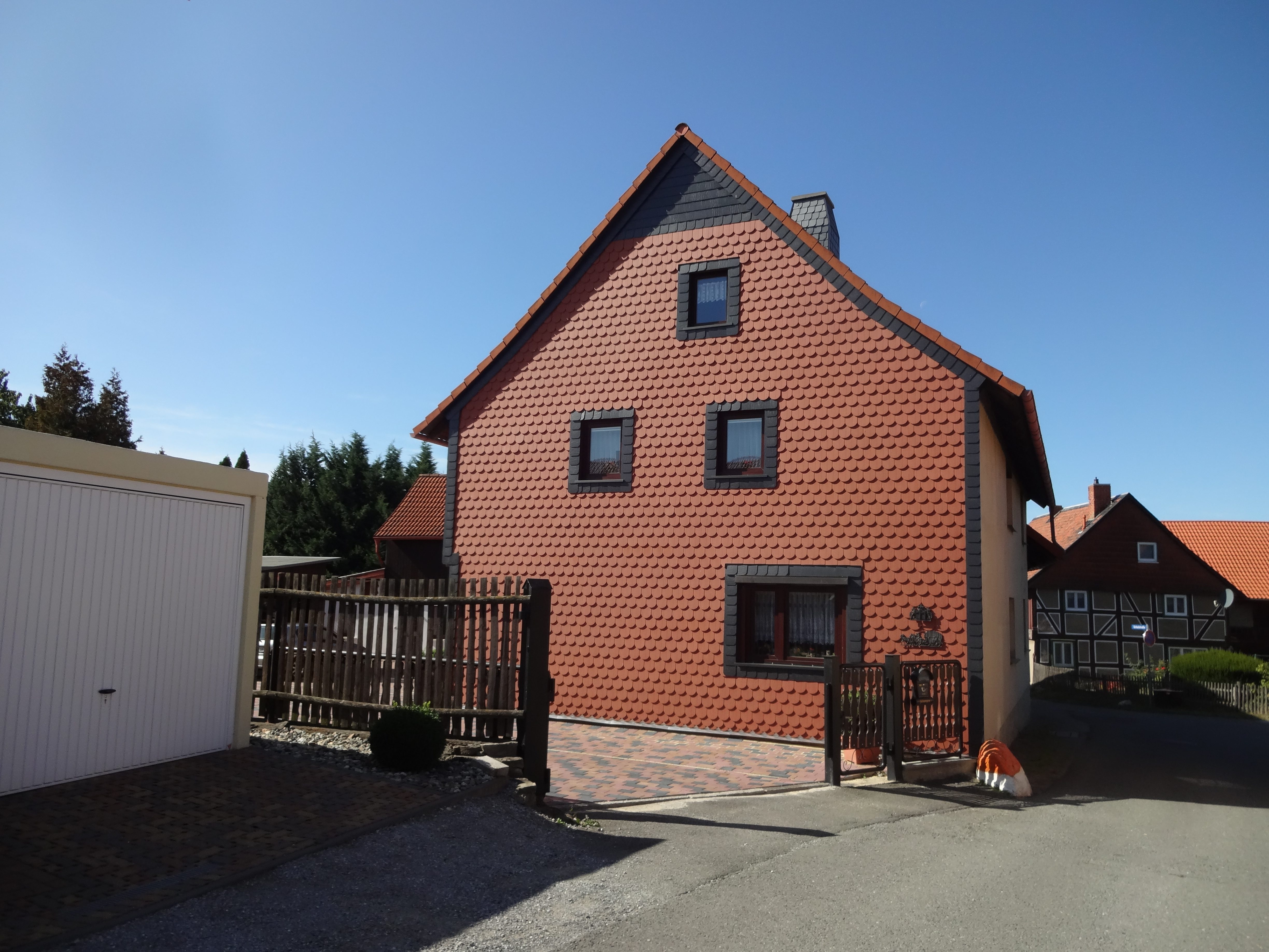 ehemals denkmalgeschütztes Bauernhaus im Mühlenwinkel 11 in Drübeck